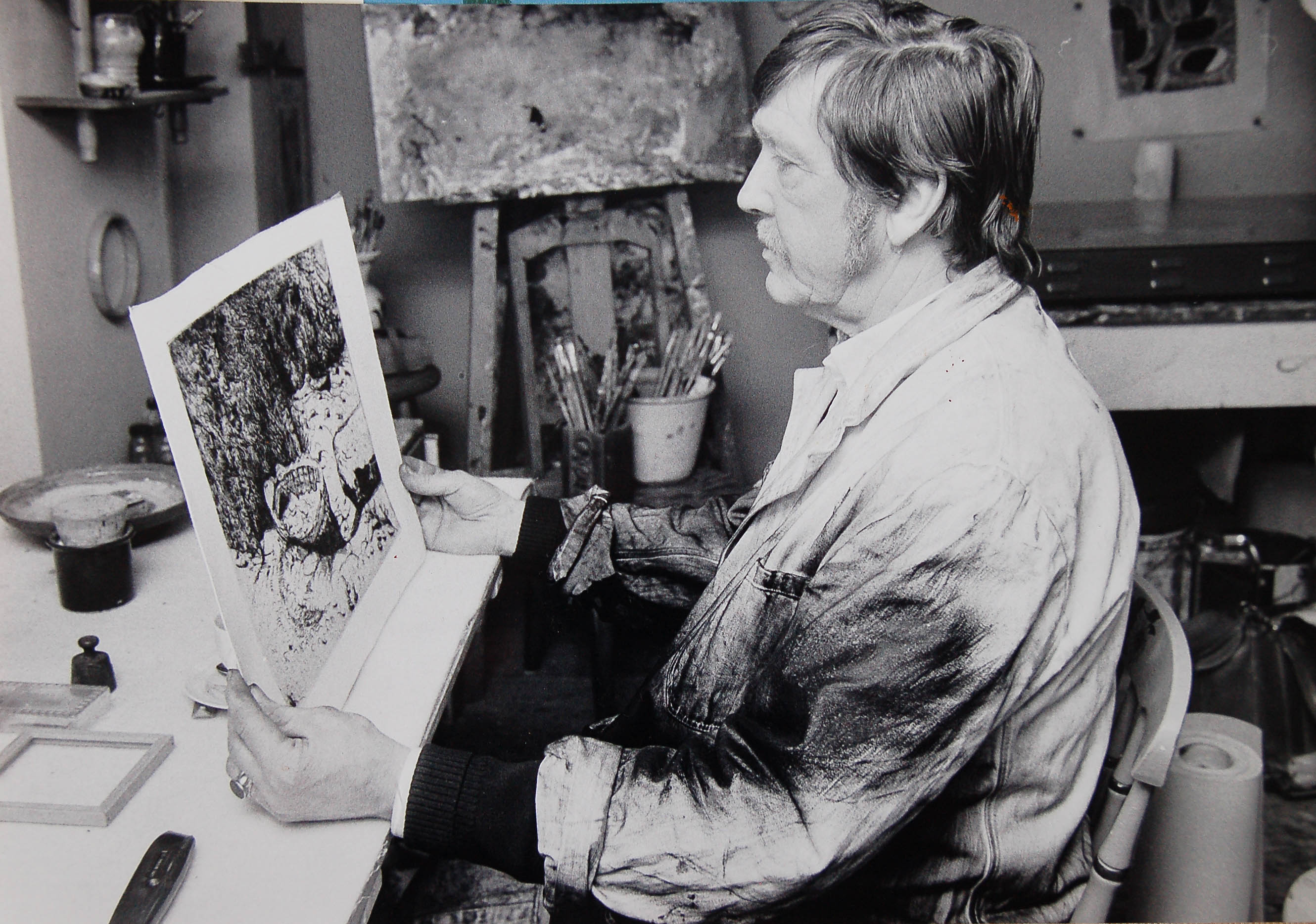 Olle Rhönnstad, grafikverkstaden, Väse Blomsterhult, Värmland